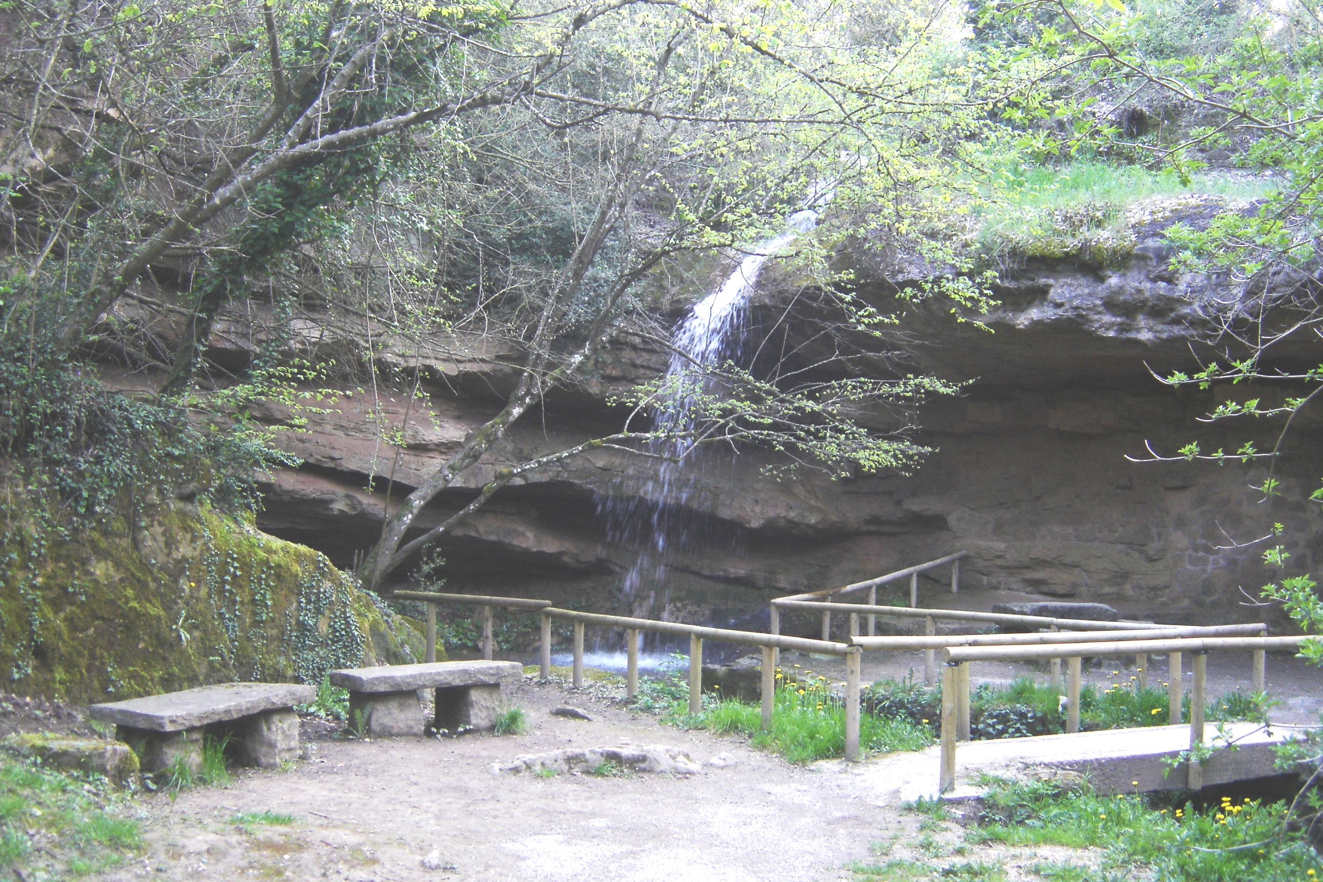 L'entorn de la font de la Mina, a Solsona (Solsonès). La cascada, el toll i la balma